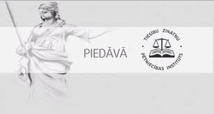 Filma "Vai Satversme jau gatava?"